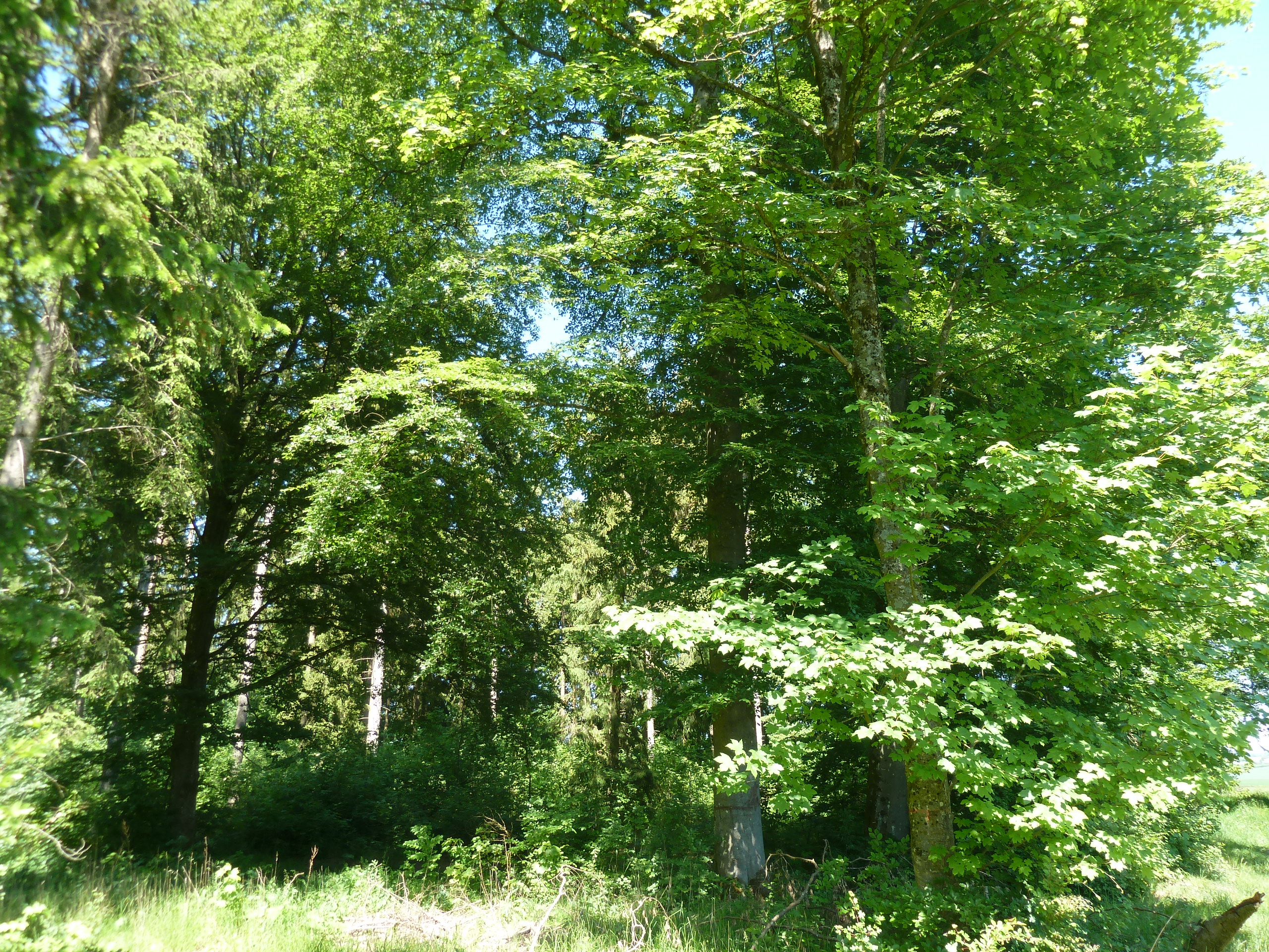 3 Buchen am Waldrand Brünstholz